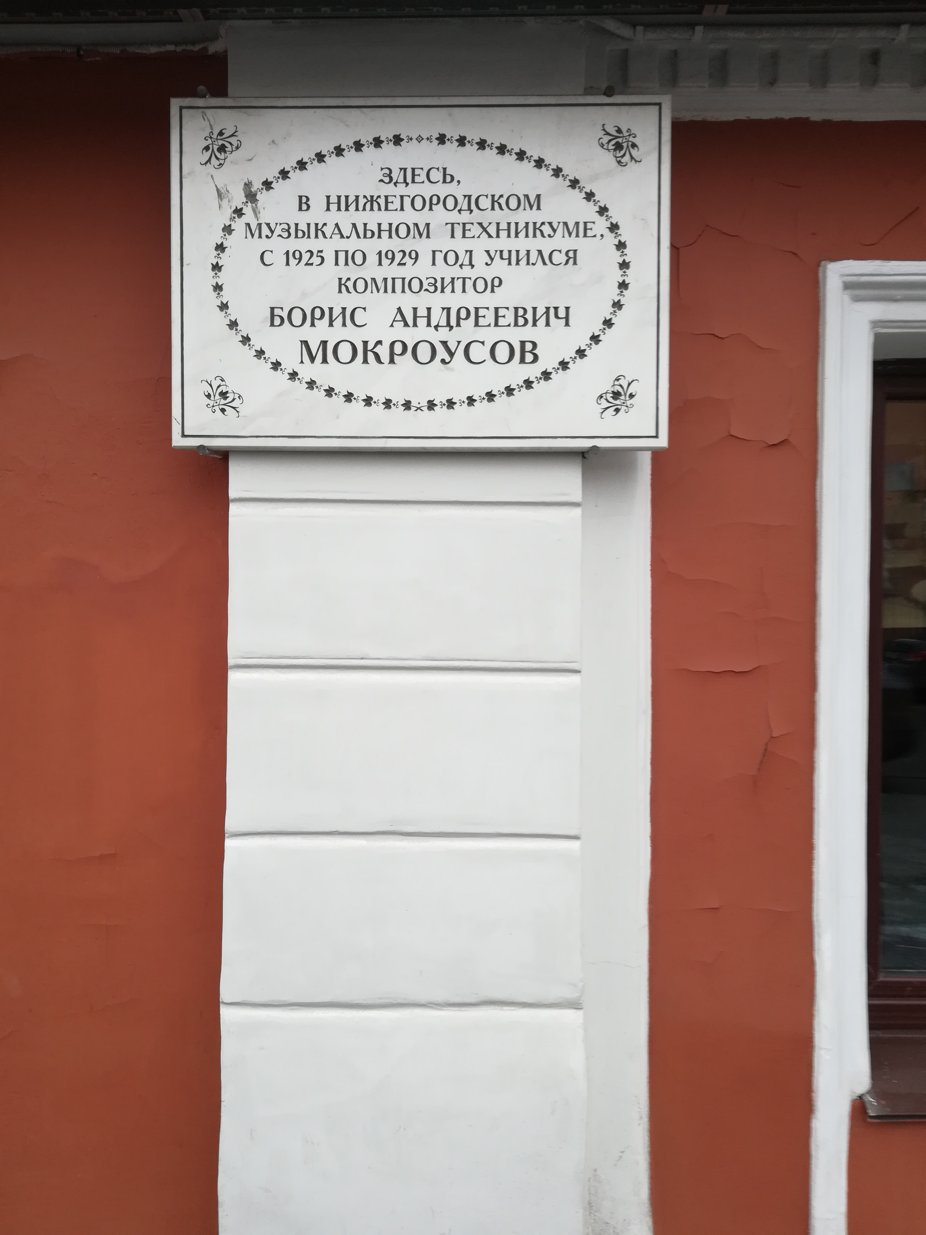 Нижний Новгород